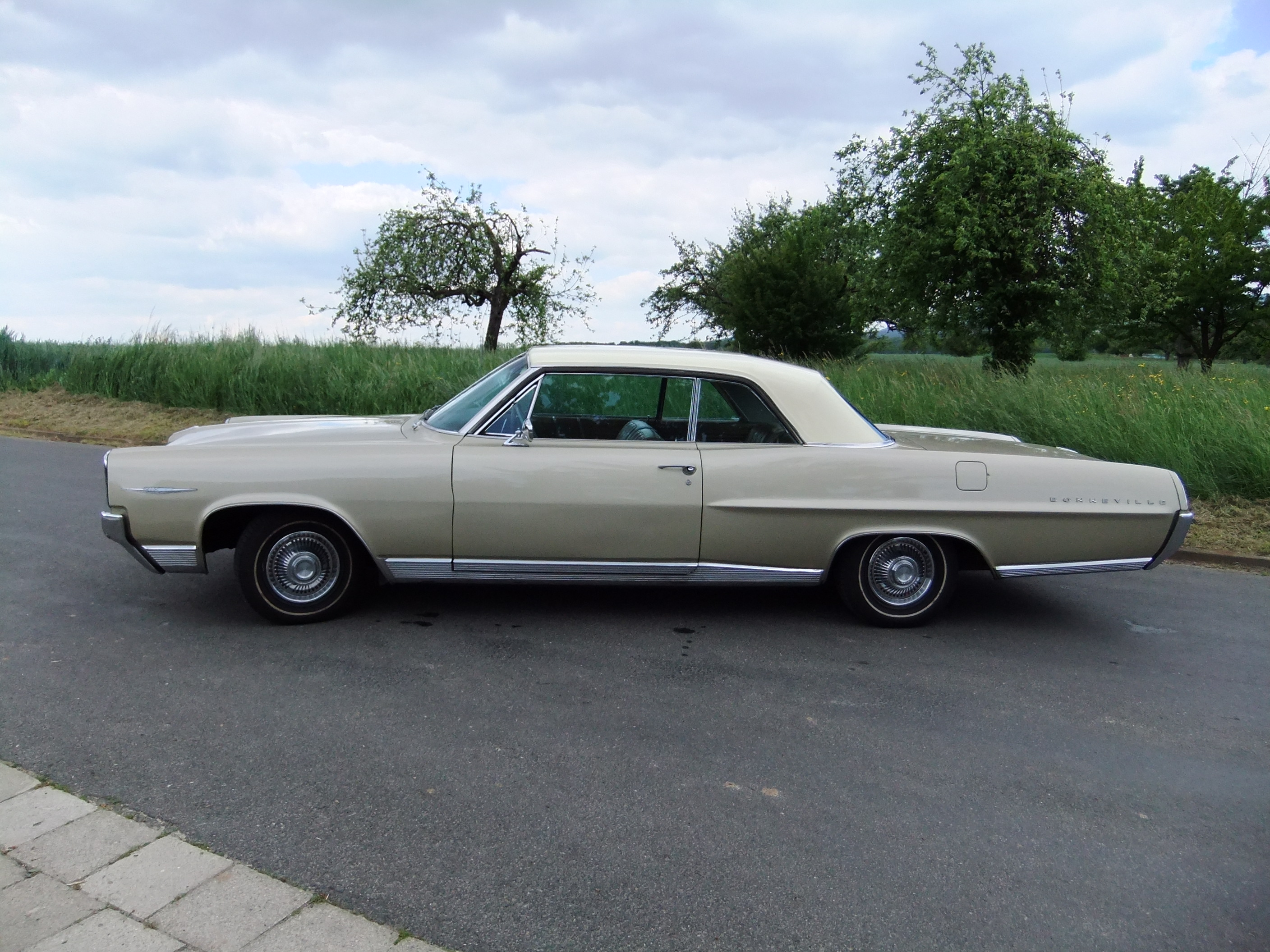 Pontiac - Bonneville - 1964 - Seitenansicht links